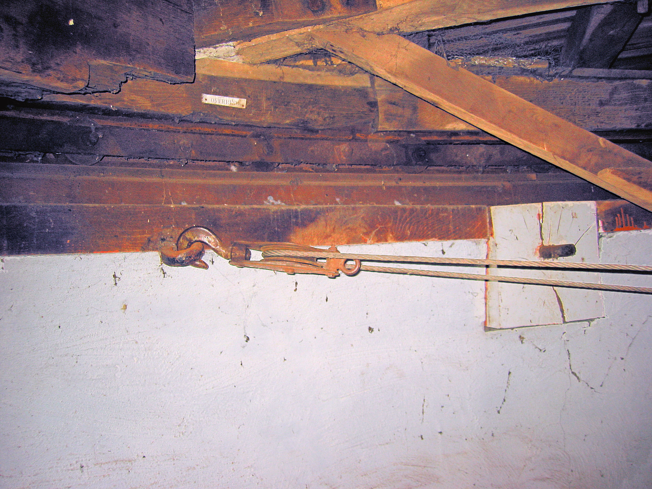 Molen De Zwaan kruiogen, Lienden, Gelderland, the Netherlands